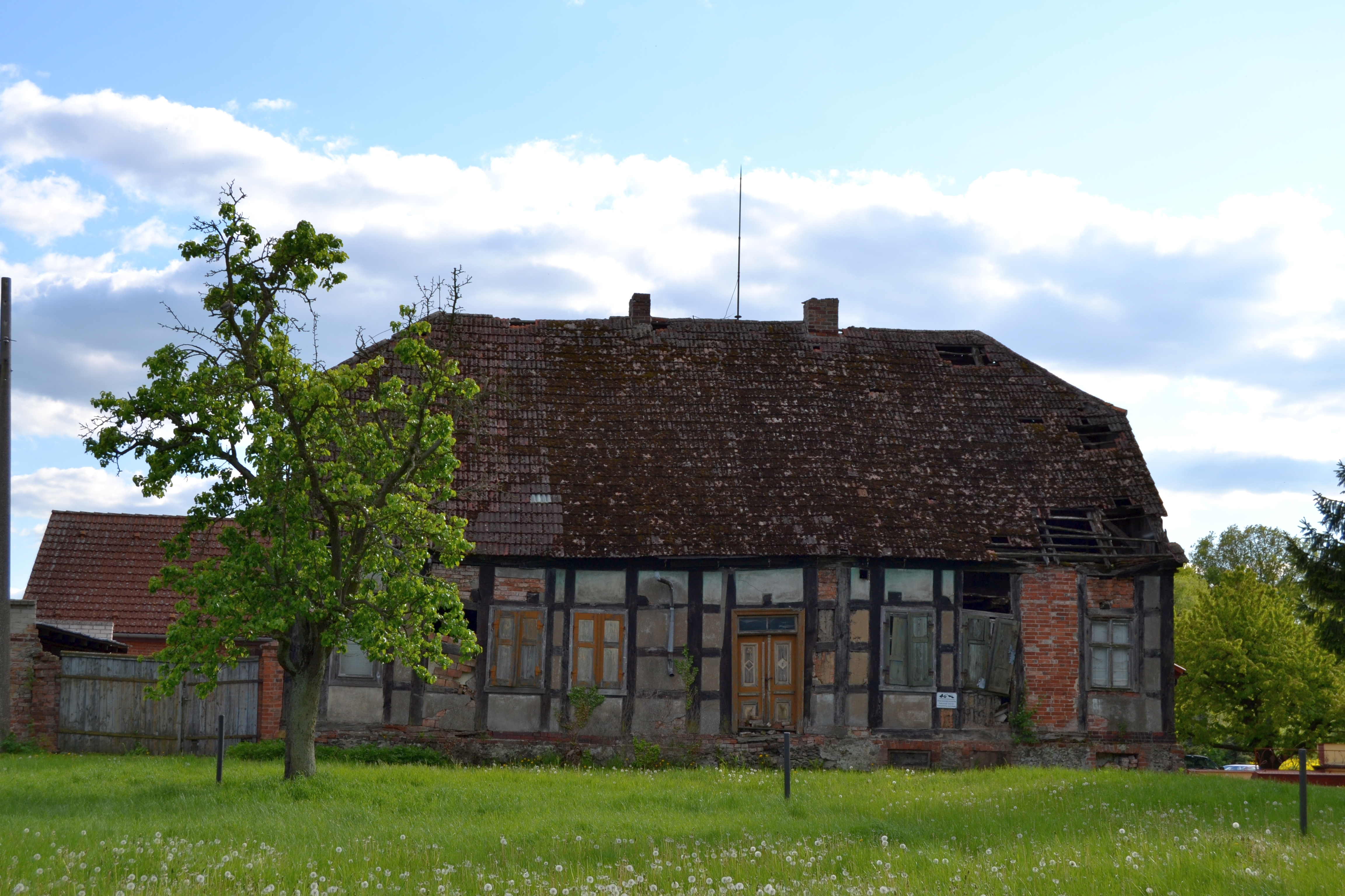 Fotoprojekt – Zwischen Berlin und Oder 2014 Photo project “Between Berlin and River Oder 2014” Baudenkmal Wohnhaus Bauerndorf 15a, Ortwig, Gemeinde Letschin.